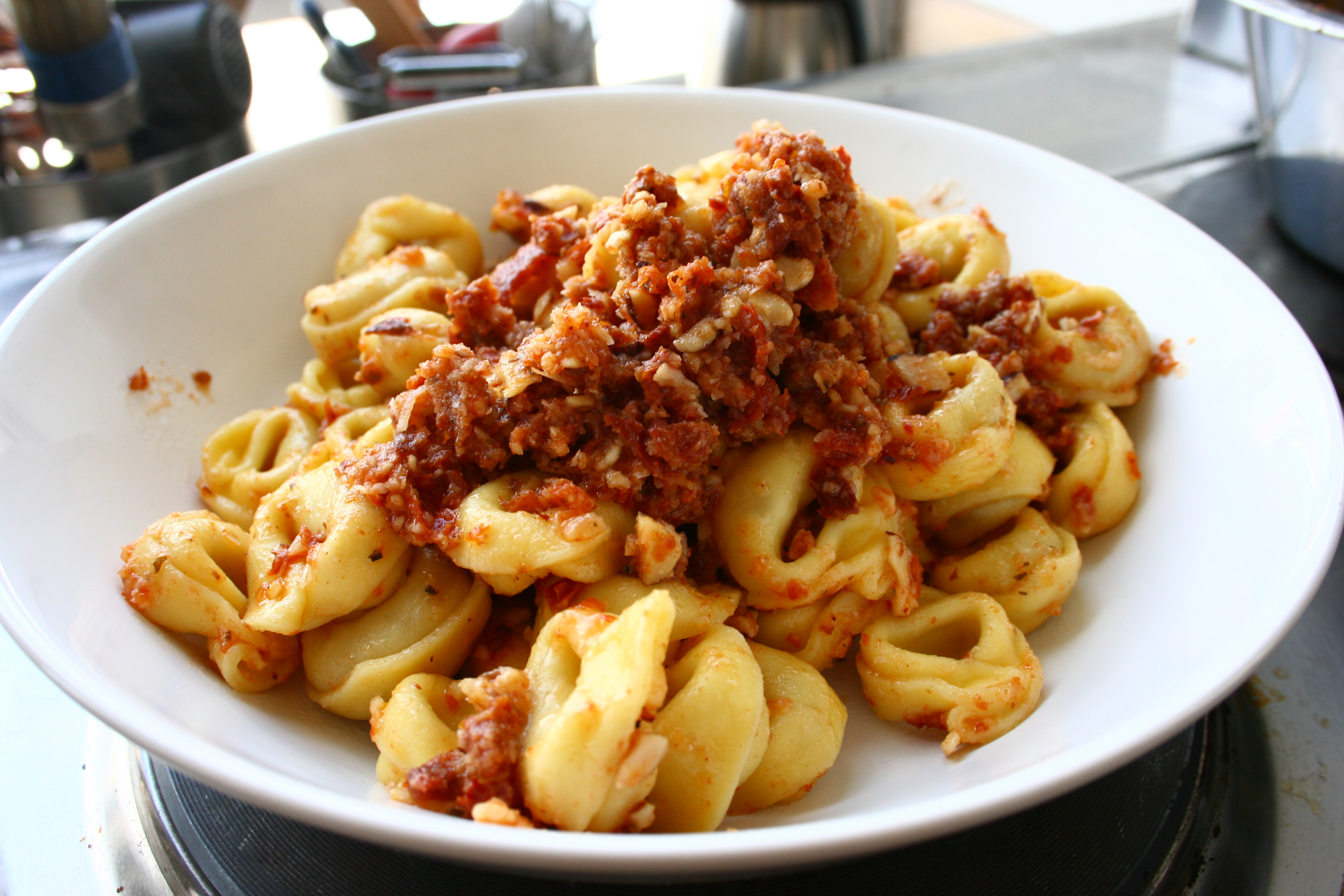 Tortellini und Pesto Rosso